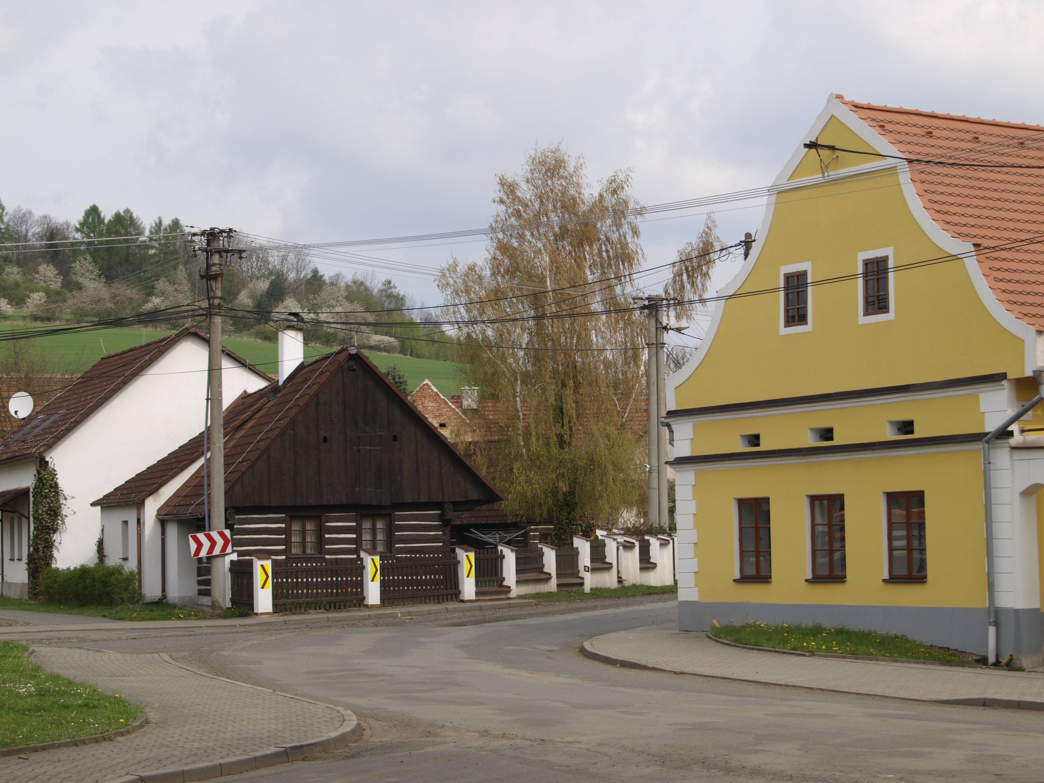 Chocomyšl, okres Domažlice Project: Fotíme Česko.